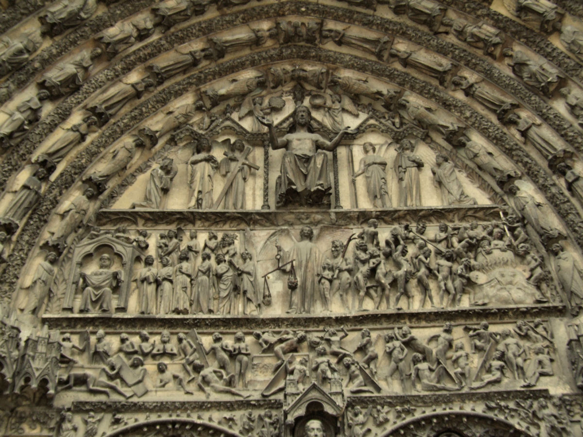 Cathédrale Saint-Étienne de Bourges, France